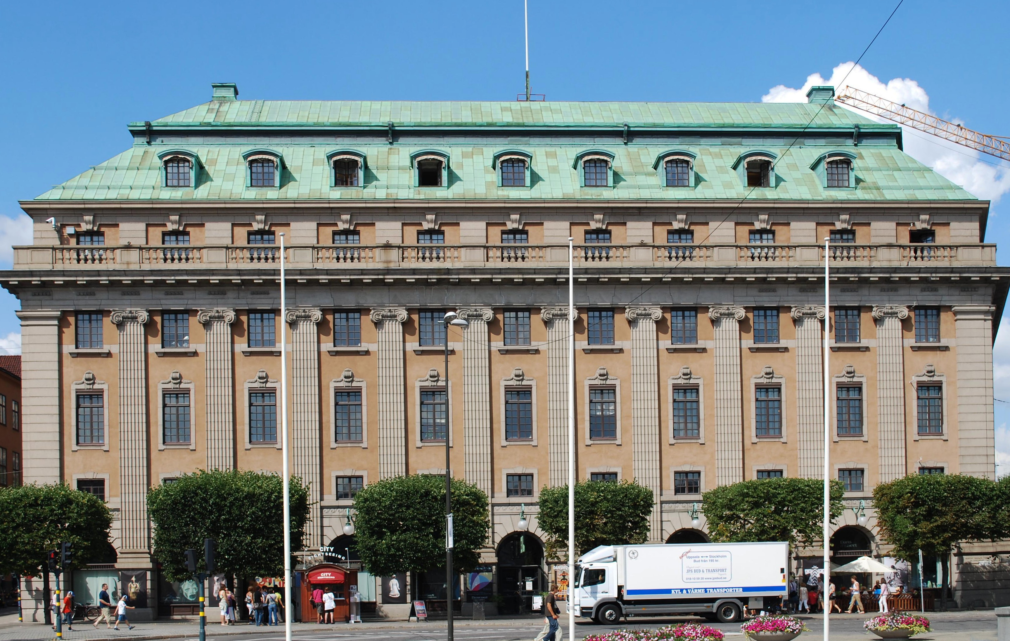 Skandinaviska bankens palats vid Gustav Adolfs Torg i Stockholm. Byggt 1915-18. Arkitekt Erik Josephson.